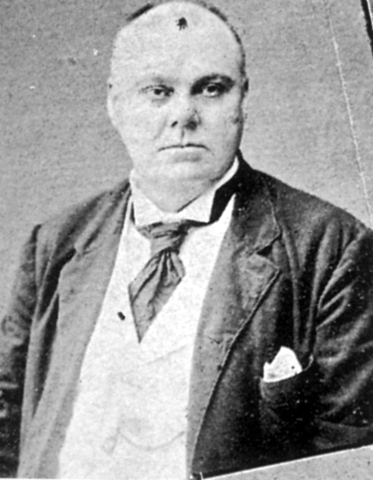 快楽亭ブラック 英国領オーストラリア生まれの落語家。